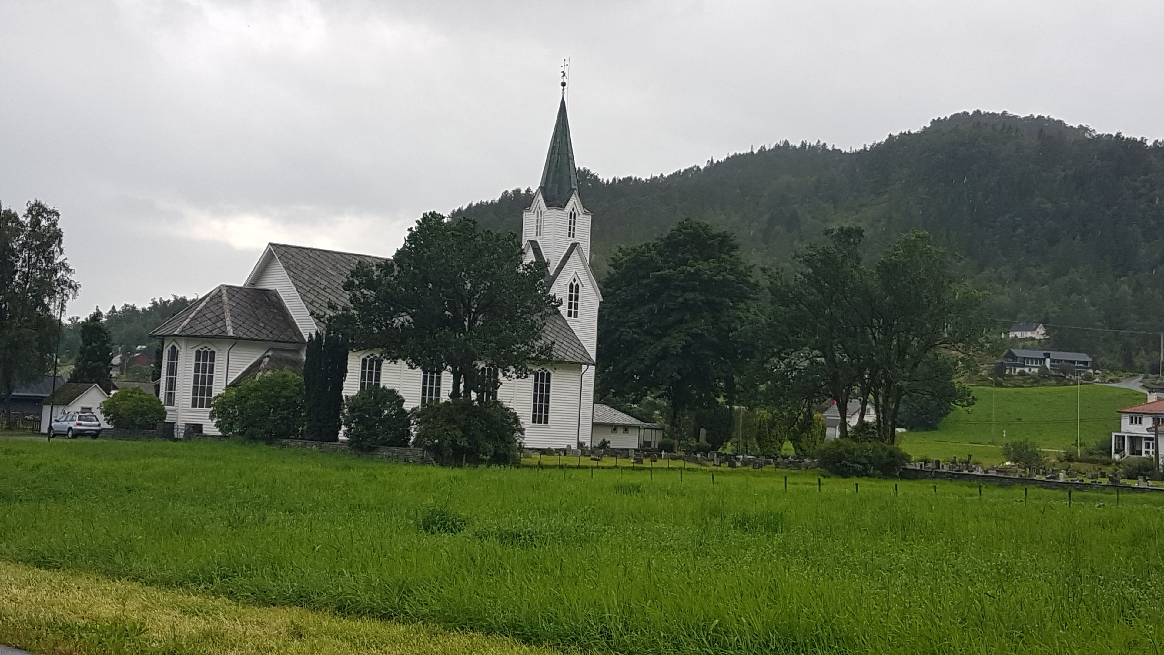 Strandebarm kirke. Foto: Roger Grimelid. Fra Riksantikvarens Kulturminnesøk.